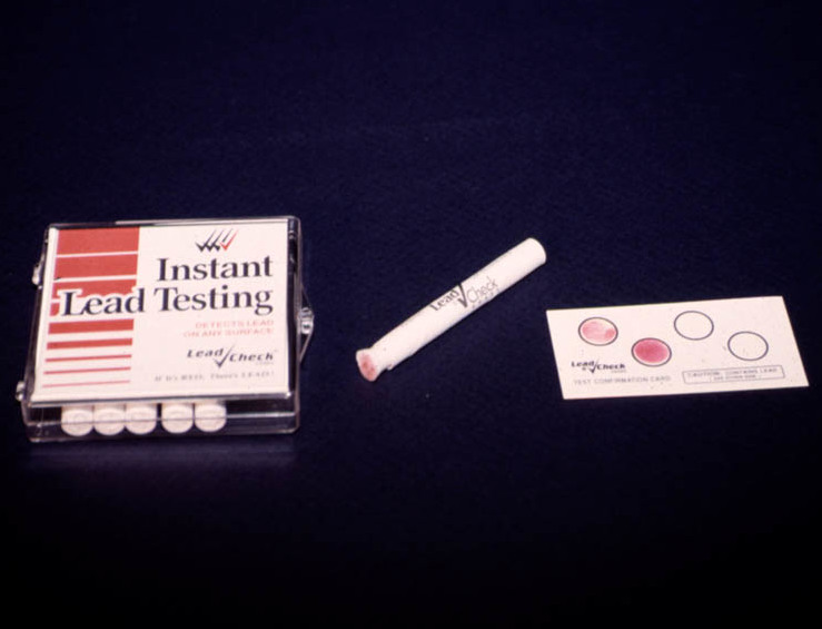 Lead sampling test kit